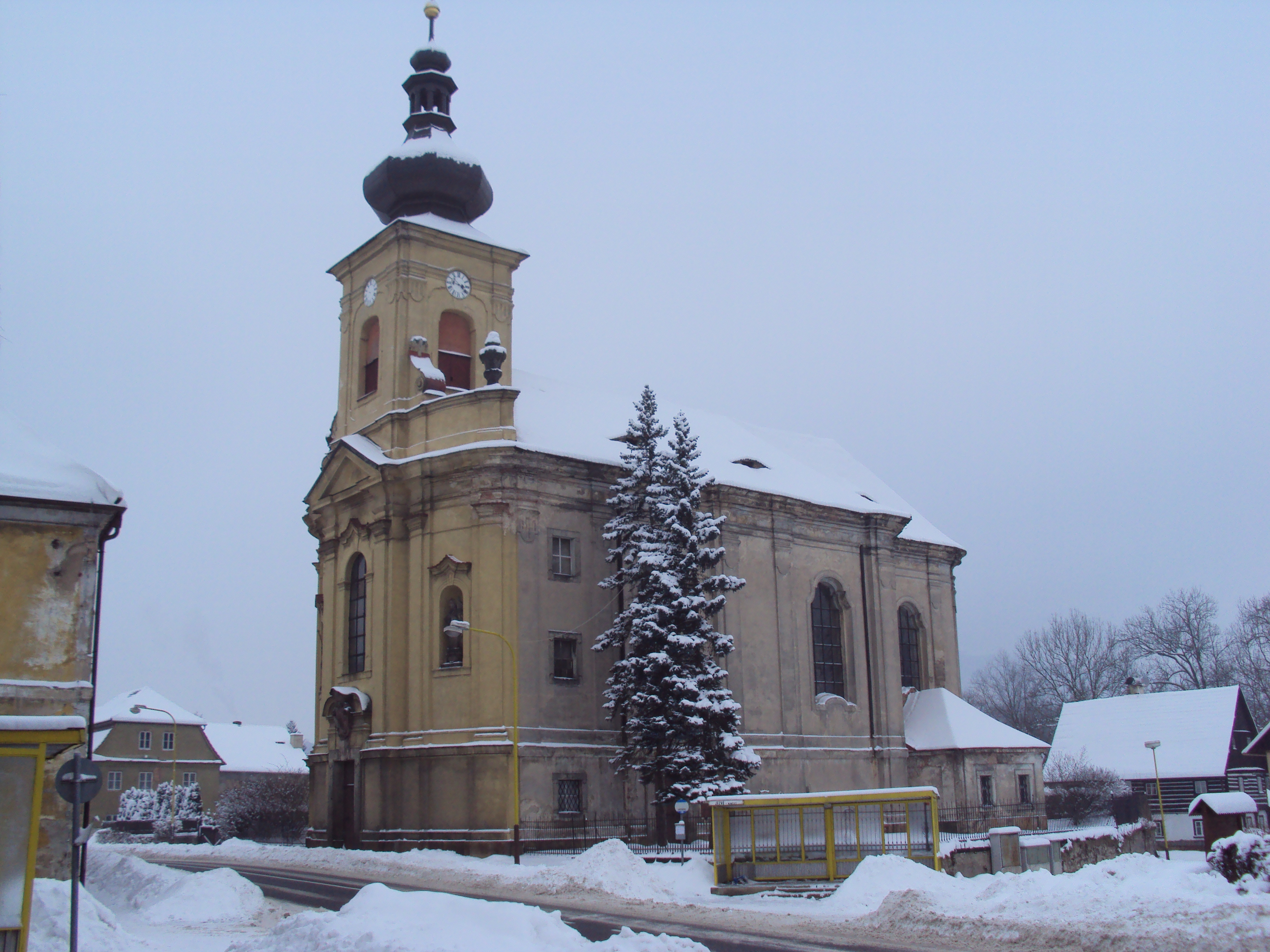 Kostel v obci Jezvé u silnice, uzavřen, neoznačen